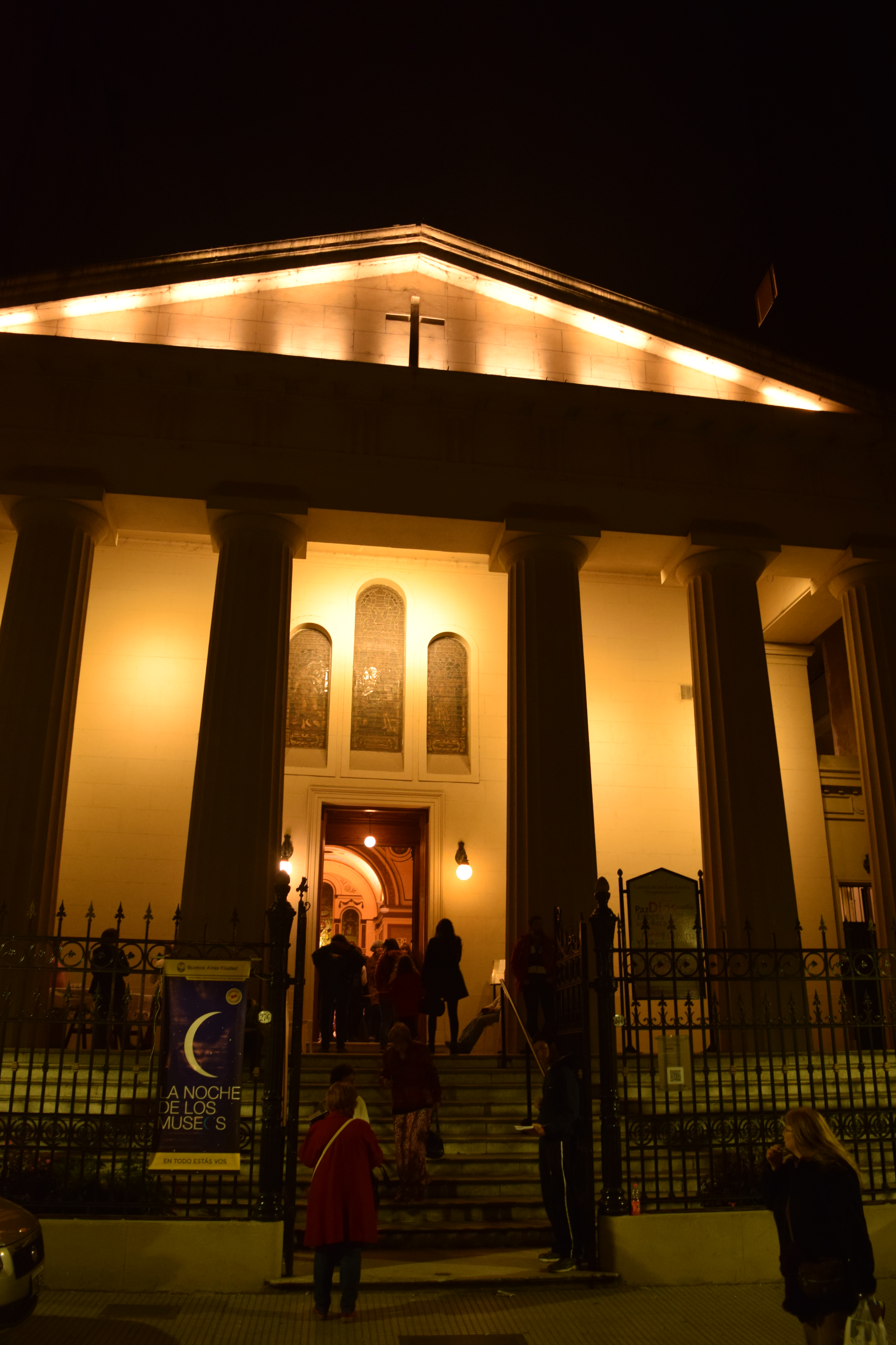 Catedral Anglicana de San Juan Bautista en la ciudad de Buenos Aires (Argentina) durante la Noche de los Museos.